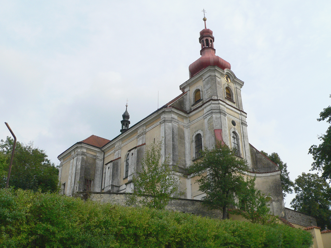 Kostel svatého Jana Křtitele, Běstvina.